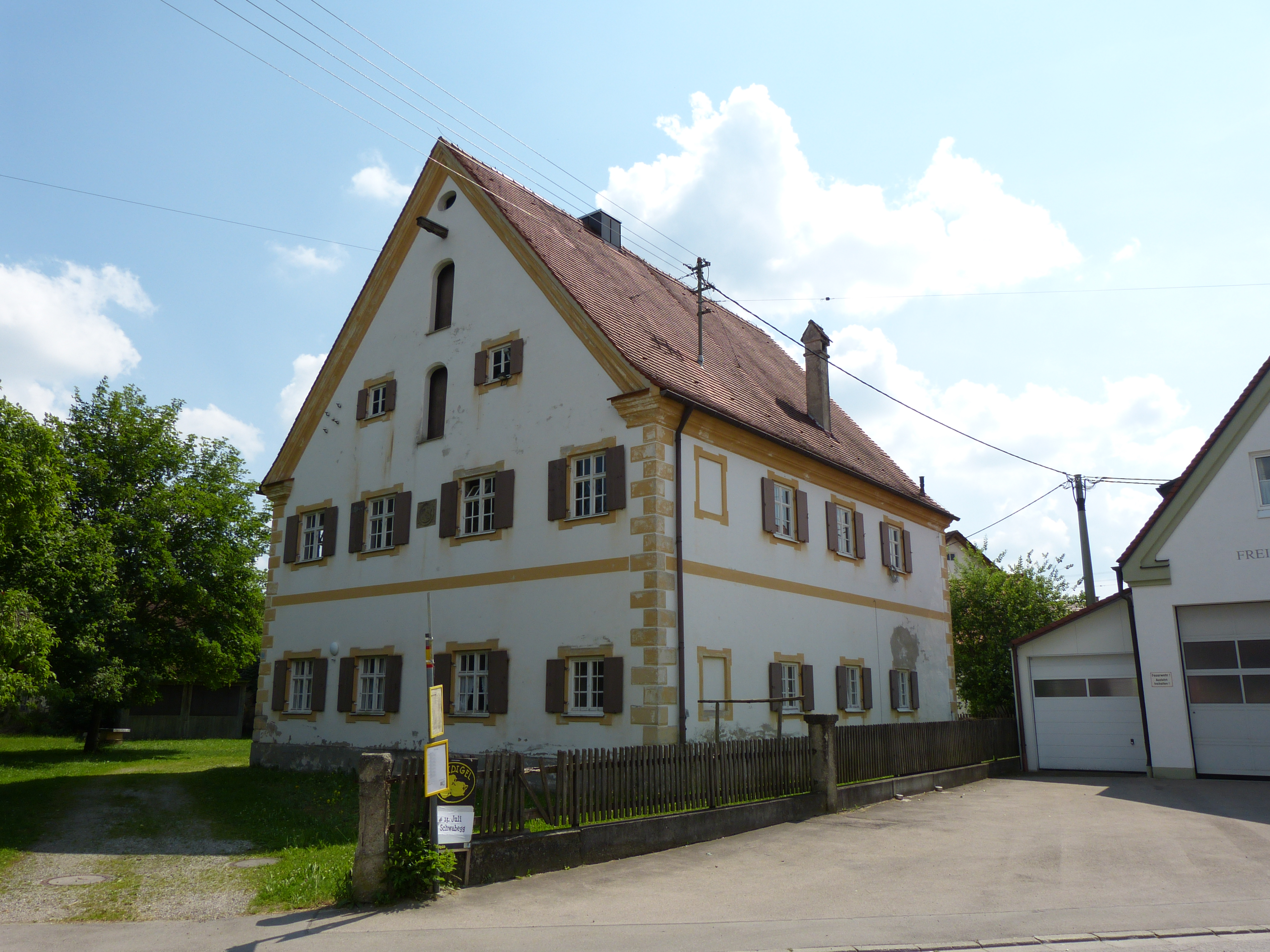 Pfarrhof, Siebnach bei Ettringen, Landkreis Unterallgäu, Bayern, Deutschland